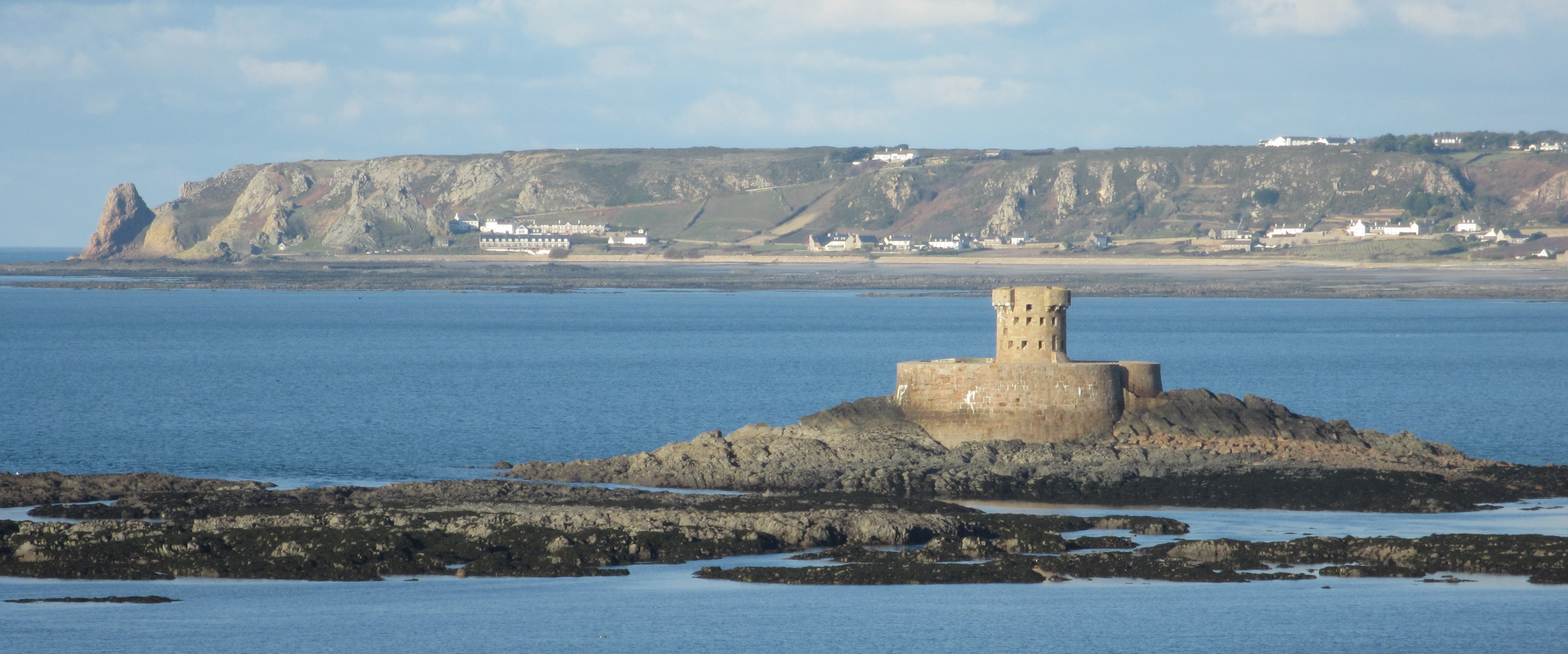 Nrf: L'Êta et La Rocque-Ho, Jèrri